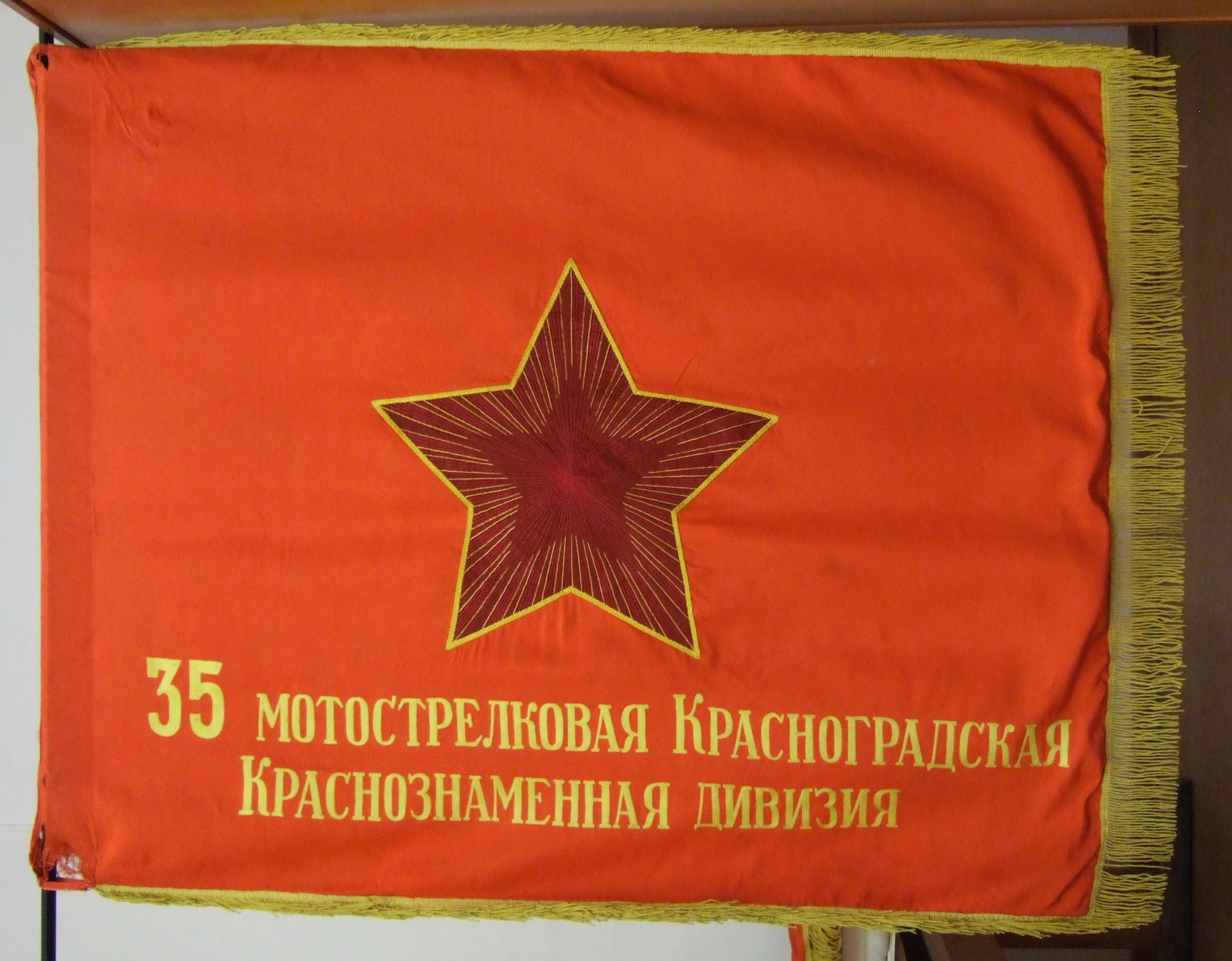 Боевое Знамя 35 мотострелковой дивизии Советской Армии, фото сделано в Знамённом Фонде Центрального музея ВС